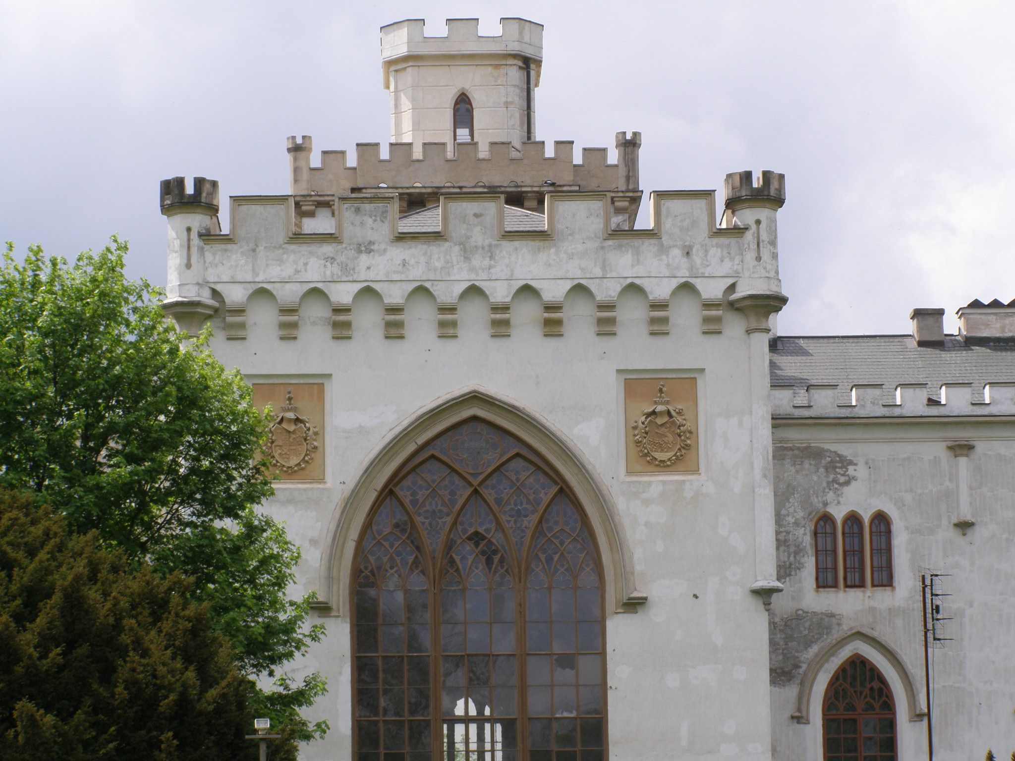 Rusovce - kaštieľ, zadný trakt